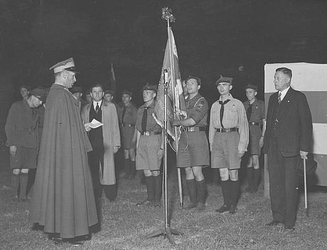 Major kawalerii Franciszek Karassek przemawia podczas uroczystości poświęcenia sztandaru V Drużyny Harcerskiej w Katowicach przed wręczeniem sztandaru wojewodzie śląskiemu Leonowi Malhomme (11 czerwca 1939).